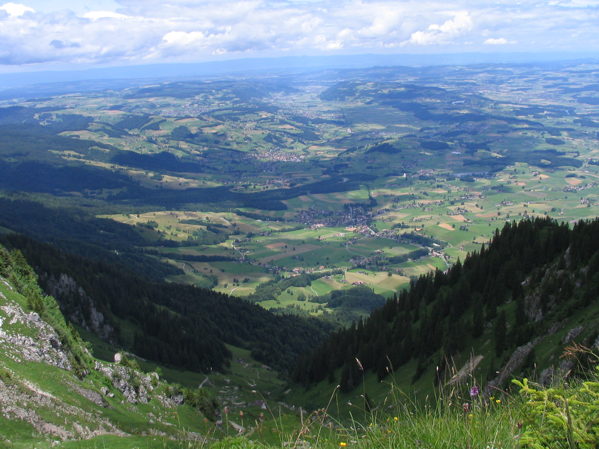 Gürbetal von Süden aus gesehen. Quellgebiet links ausserhalb des Bildes, Übergang ins flache Land etwa in der Mitte des Bildes, weiterer Verlauf gegen Norden im Bild gegen oben zwischen Längenberg links und Belpberg rechts. Aufnahme vom Walalpgrat aus.